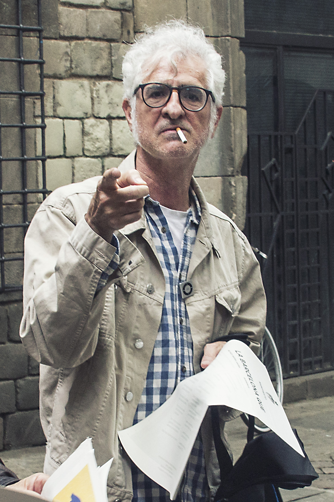 Plaça Sant Felip Neri 19/05/2015 Foto: Marc Lozano